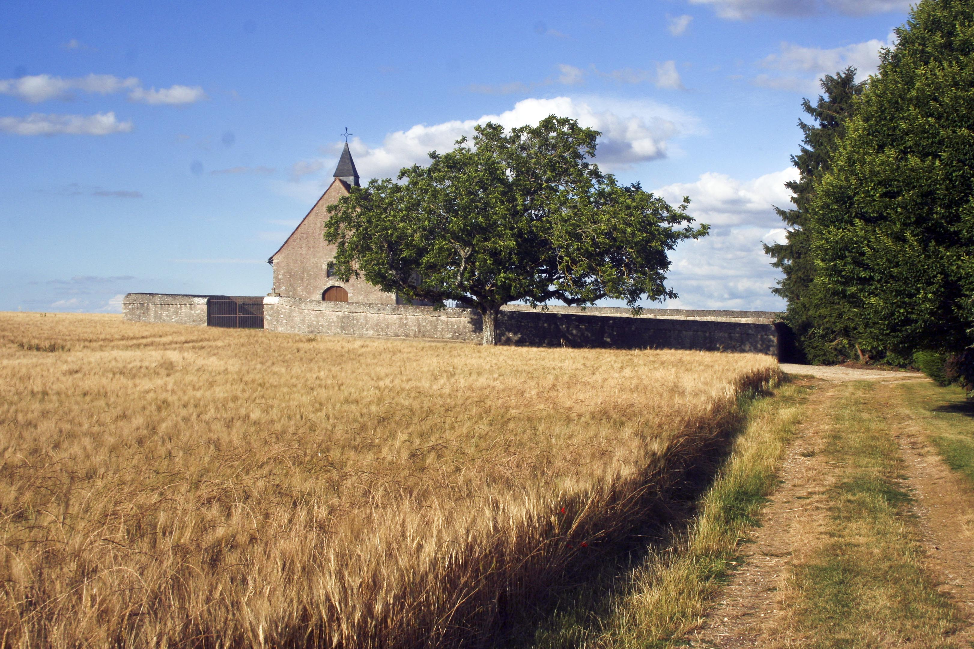 La Madeleine-Villefrouin, église